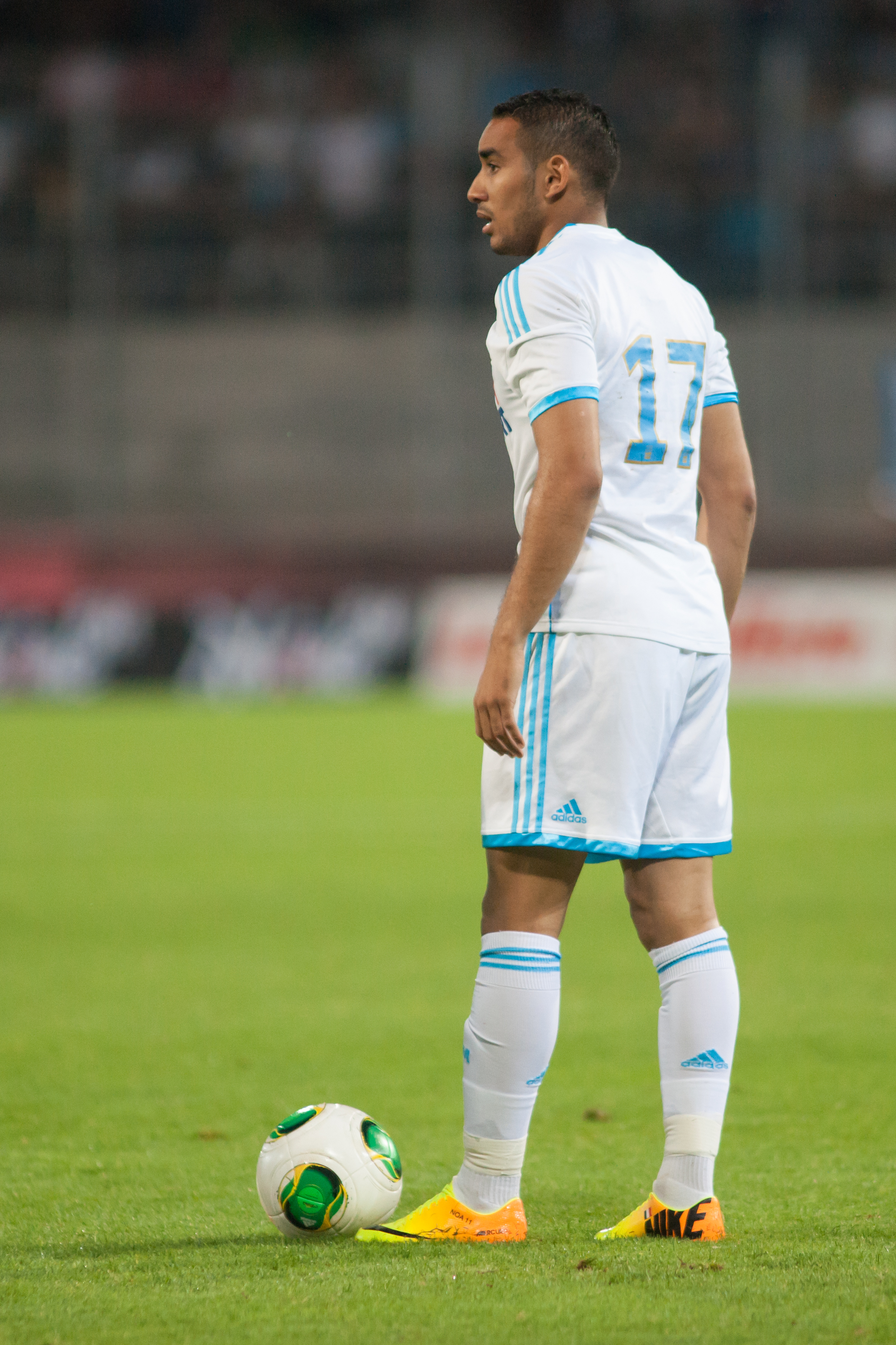 OM - FC Porto - Valais Cup 2013 - Dimitri Payet